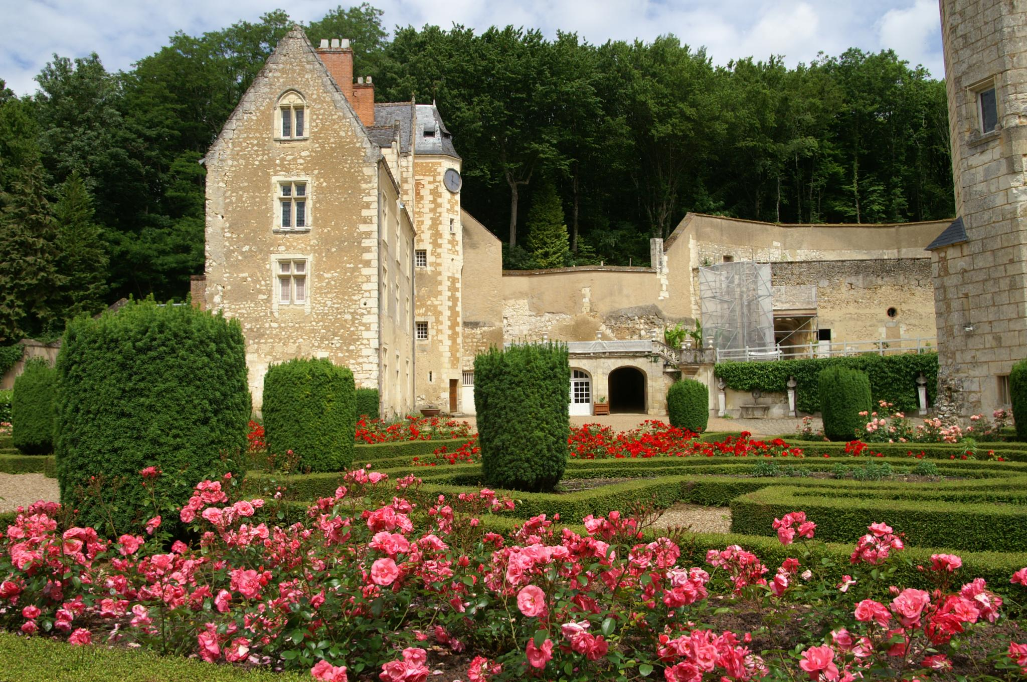 Jardin du château de Courtanvaux à Bessé-sur-Braye, Sarthe, France